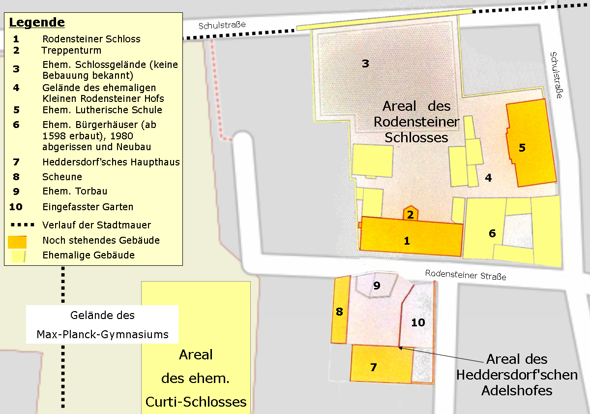 Lage und Größe des Rodensteiner Schlosses und des Heddersdorf'schen Adelshofes in Groß-Umstadt. Schematisiert sind das ehemalige Areal des Curti-Schlosses und des heutigen Max-Planck-Gymnasiums eingetragen. Lage: Nordwestecke der Altstadt an der Stadtmauer (ehemaliger Verlauf gestrichelt dargestellt) Karte basiert auf OpenStreetMap Anmerkungen: (a) Quelle Kartenmaterial: Landkarte: korr. und bearb. Ausschnitt OpenStreetMap / (b) Quelle Grundrisse: Archivmaterial und Bebilderung der Stadt Groß-Umstadt